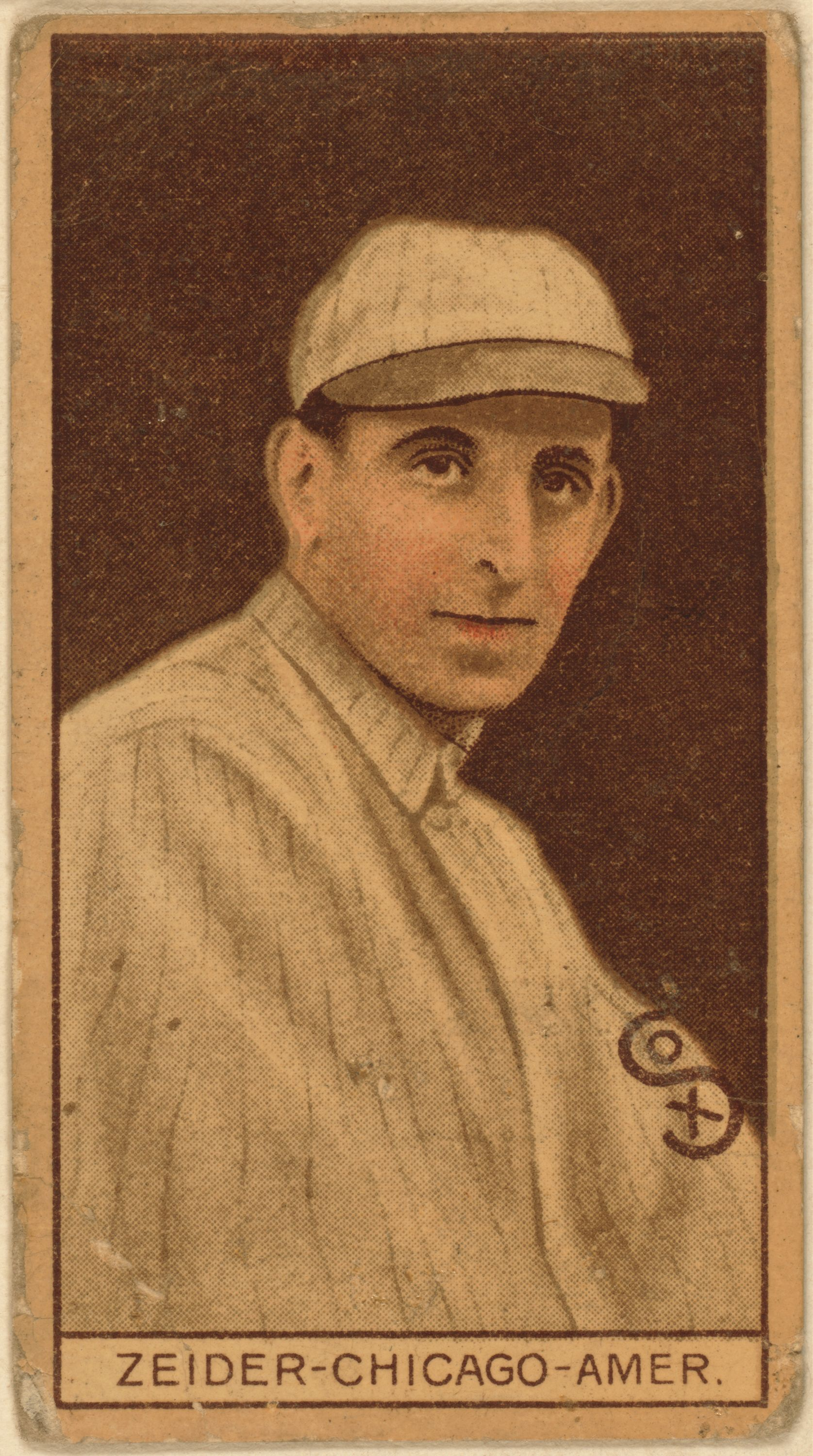 Rollie Zeider